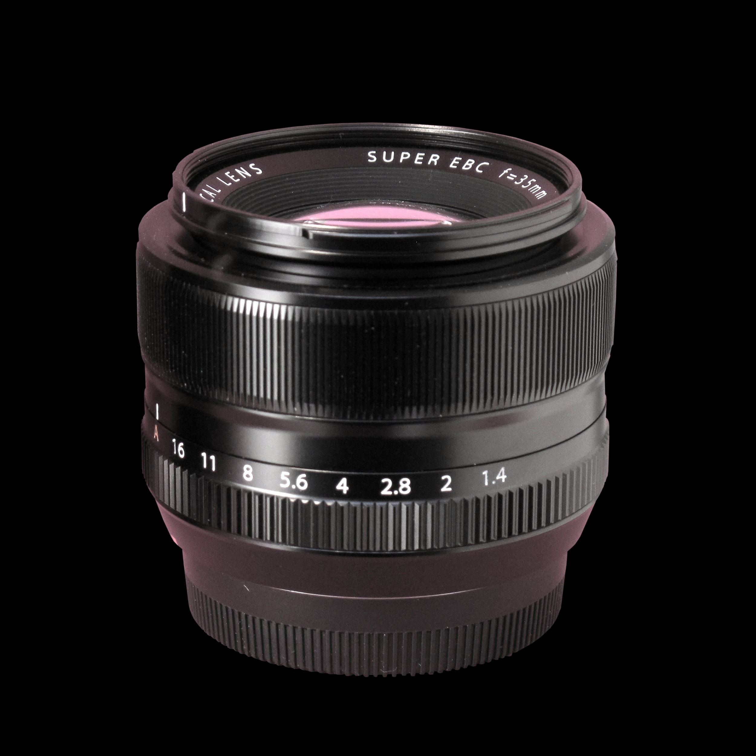 Fujifilm X-mount 35mm